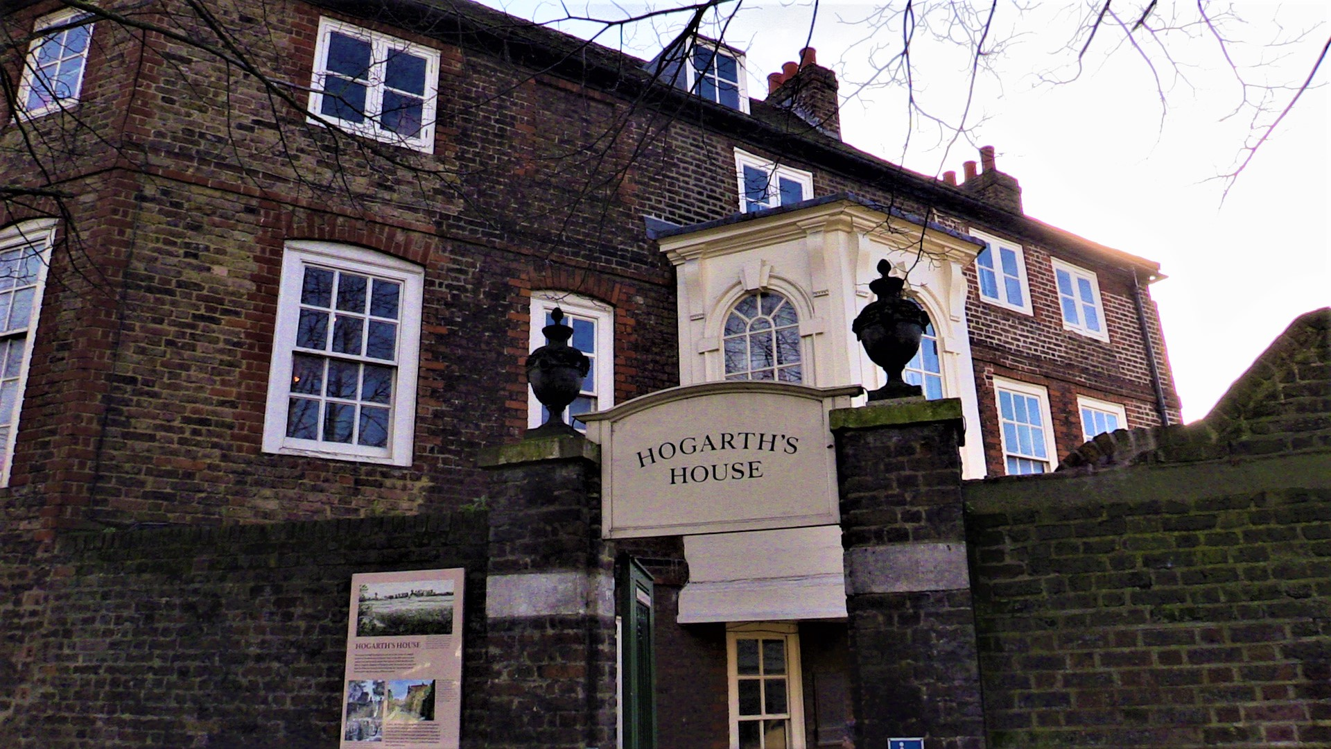 Аҧсшәа